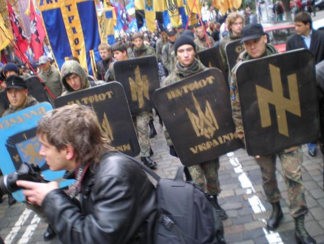 Хода «Патріота України»